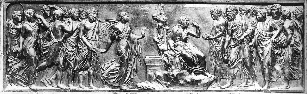 Lorenzetto, (b. 1490, Firenze, d. 1541, Roma) Christ and the Samaritan Woman 1520 Bronze altar frontal, 62 x 210 cm Santa Maria del Popolo, Rome.